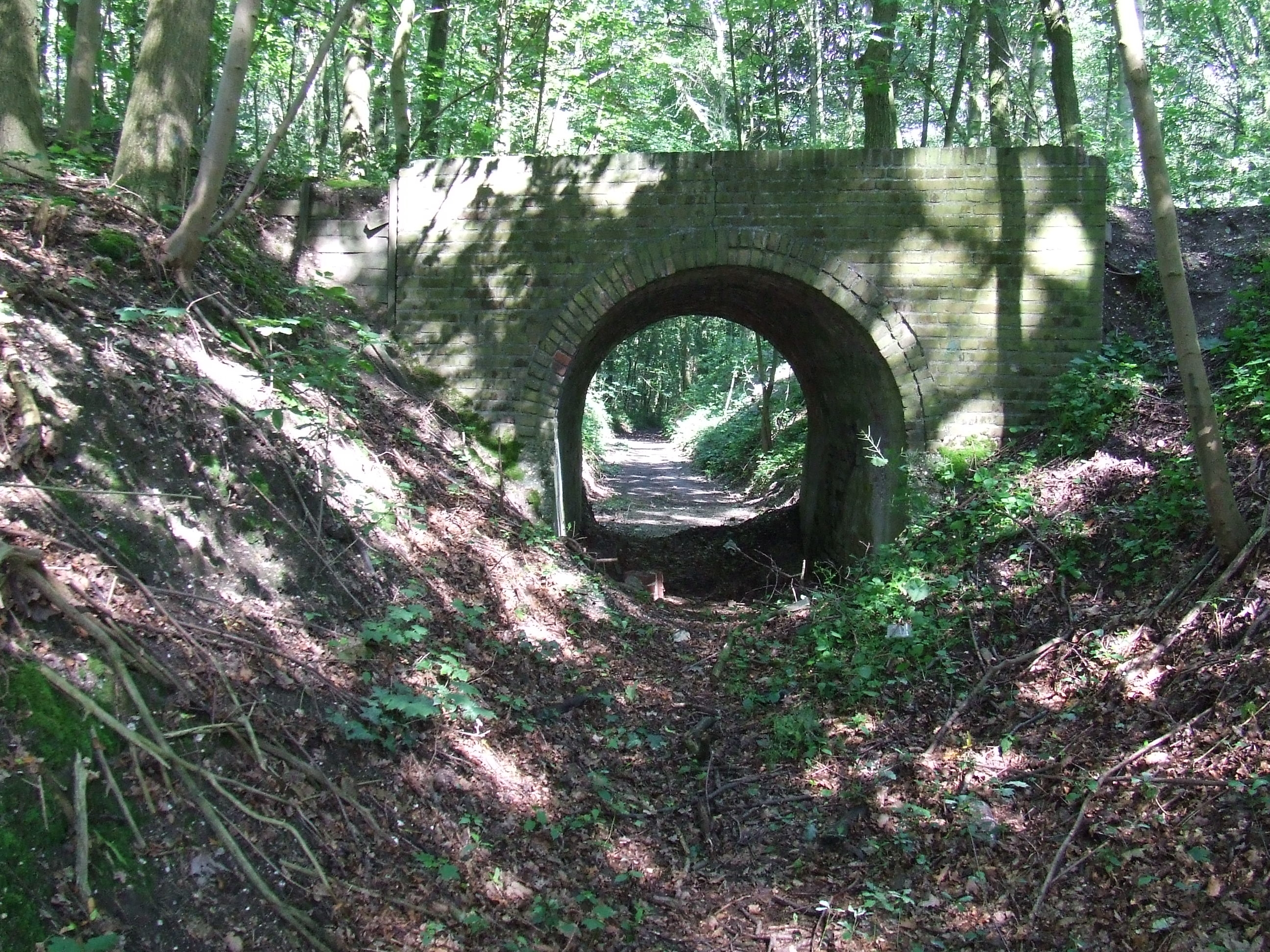 Foto van smalspoorviaduct in Tegelen